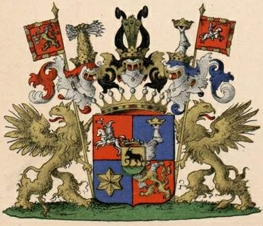 Tiesenhauseni suguvõsa krahvivapp